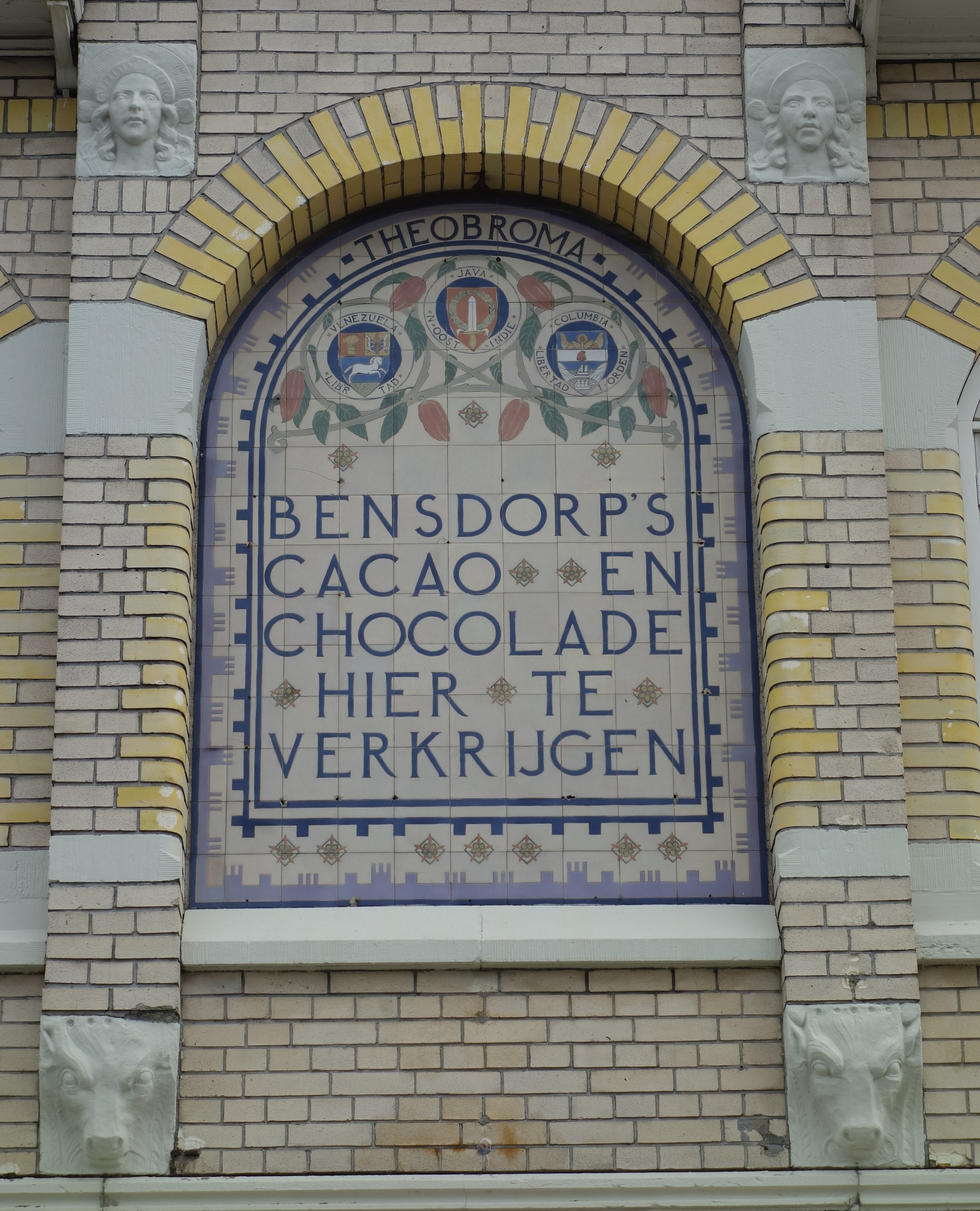 Gevelreclame voor Bensdorps Cacao aan de Stationsweg 4 in Bussum.